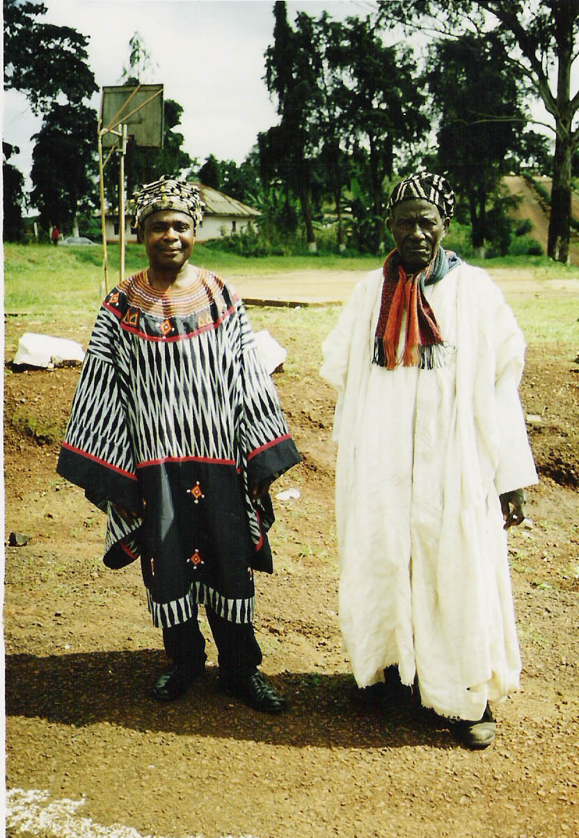 Bamileke men in Bandjoun, West Province, Cameroon